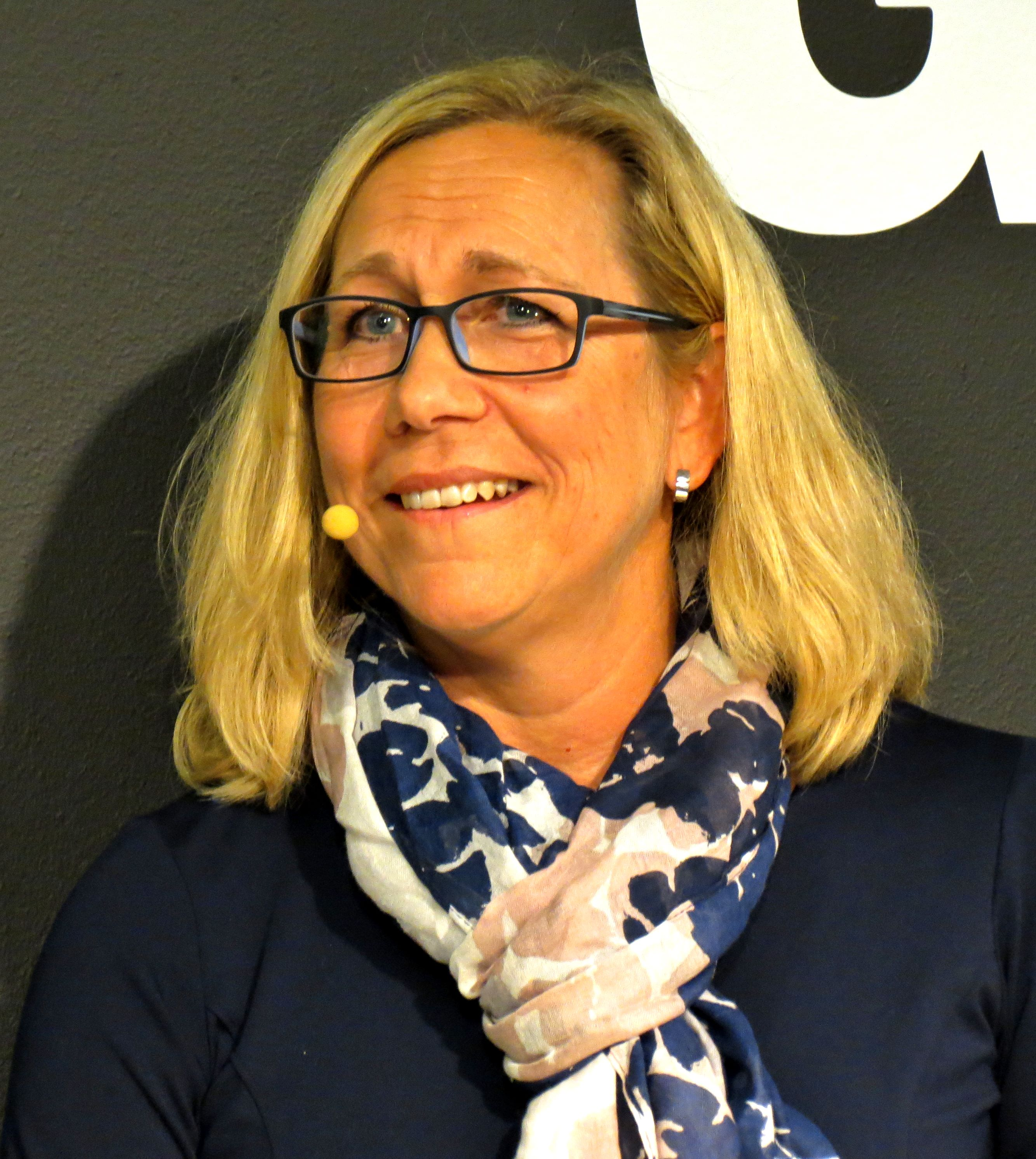 Helene Odenjung, folkpartistiskt kommunalråd i Göteborgs kommun.